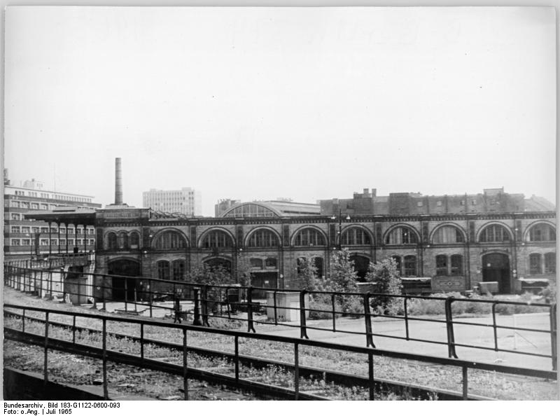 Berlin, Zentralmarkthalle Zentralbild Berlin im Juli 1965. Blick auf die Zentralmarkthalle (Großmarkthalle) ; davor die Rochstraße.